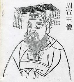 周宣王像